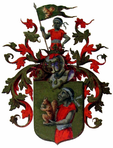 Escu des Armoiries Paris 1913